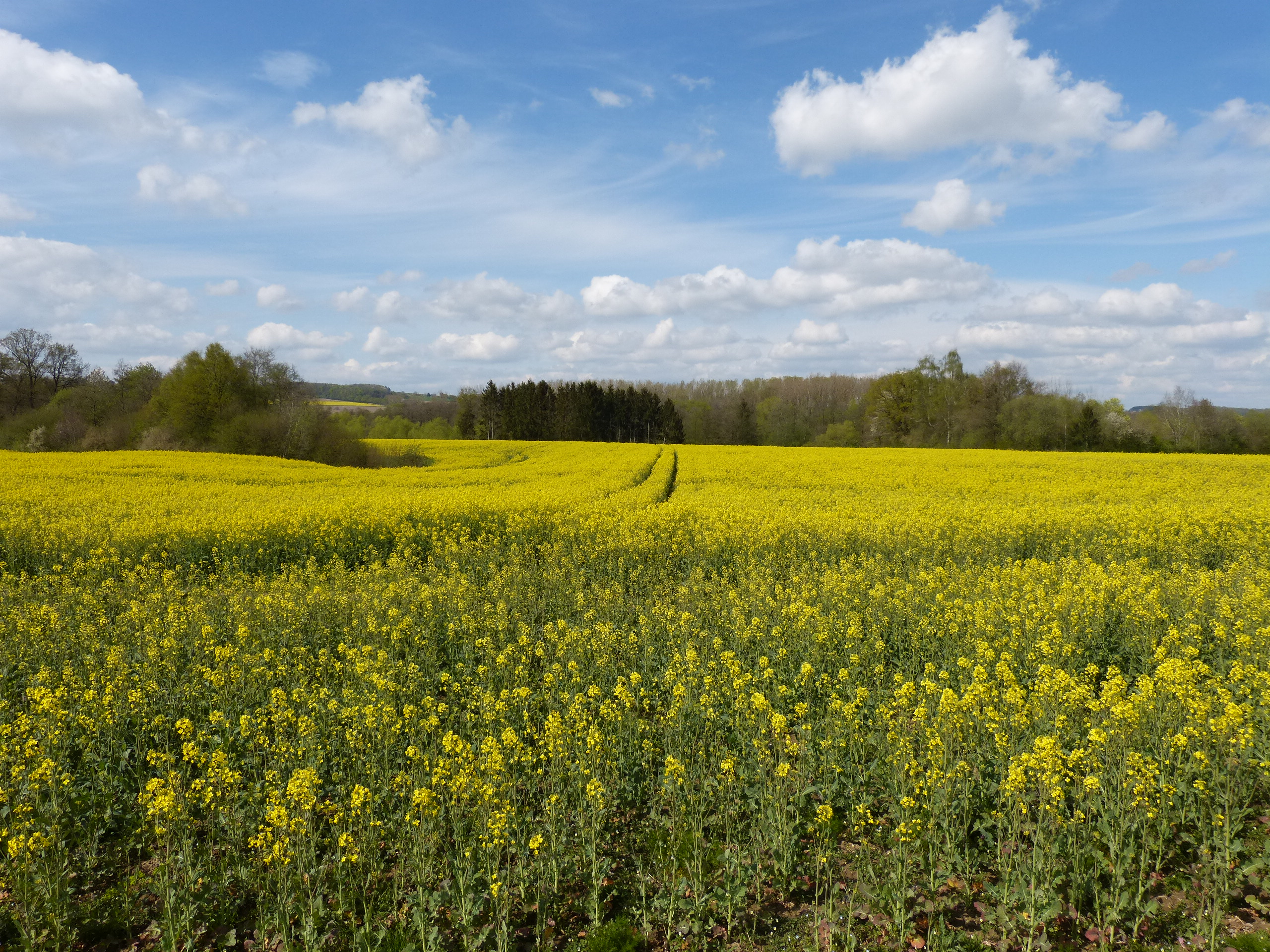 Rapsfeld in der Mendener Gemarkung Schwitten (im LSG „Märkischer Kreis“); Blick etwa von der Ecke Heideweg nach Norden in Richtung Ruhr; der Waldbereich im Hintergrund liegt überwiegend im Naturschutzgebiet „Auf dem Stein“